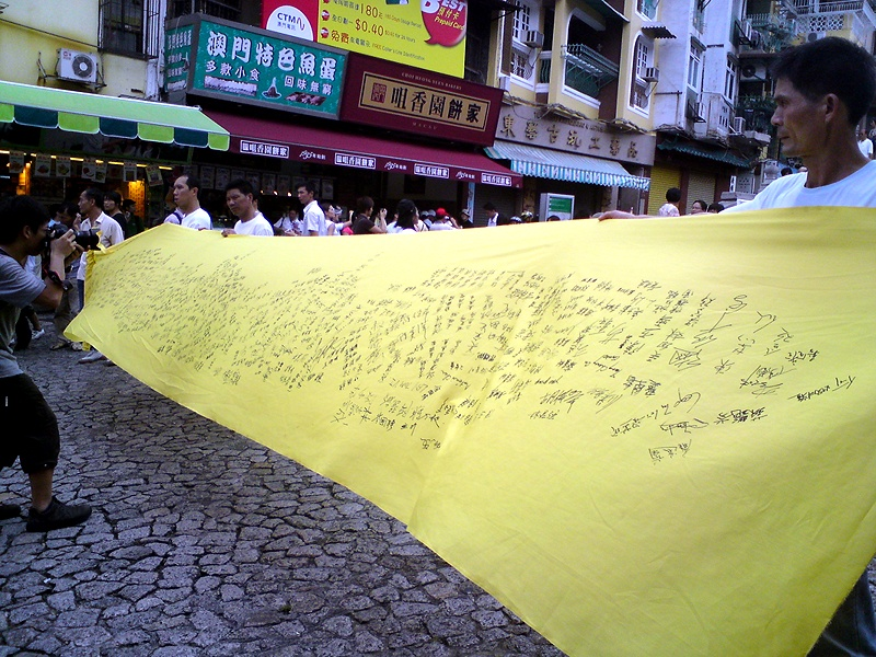 2019普選澳門特首